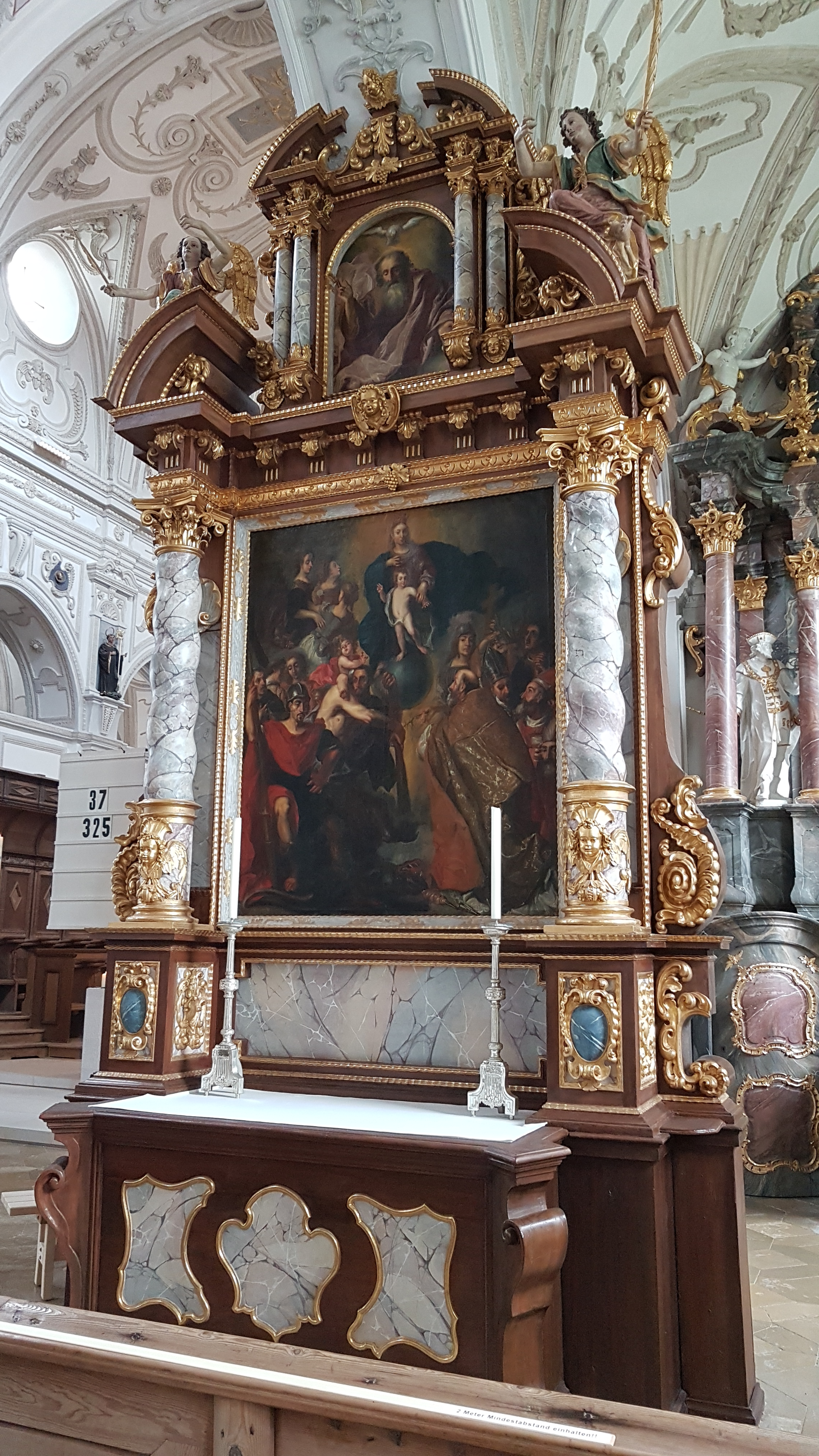 Stiftskirche St. Johannes d. T. (Steingaden)